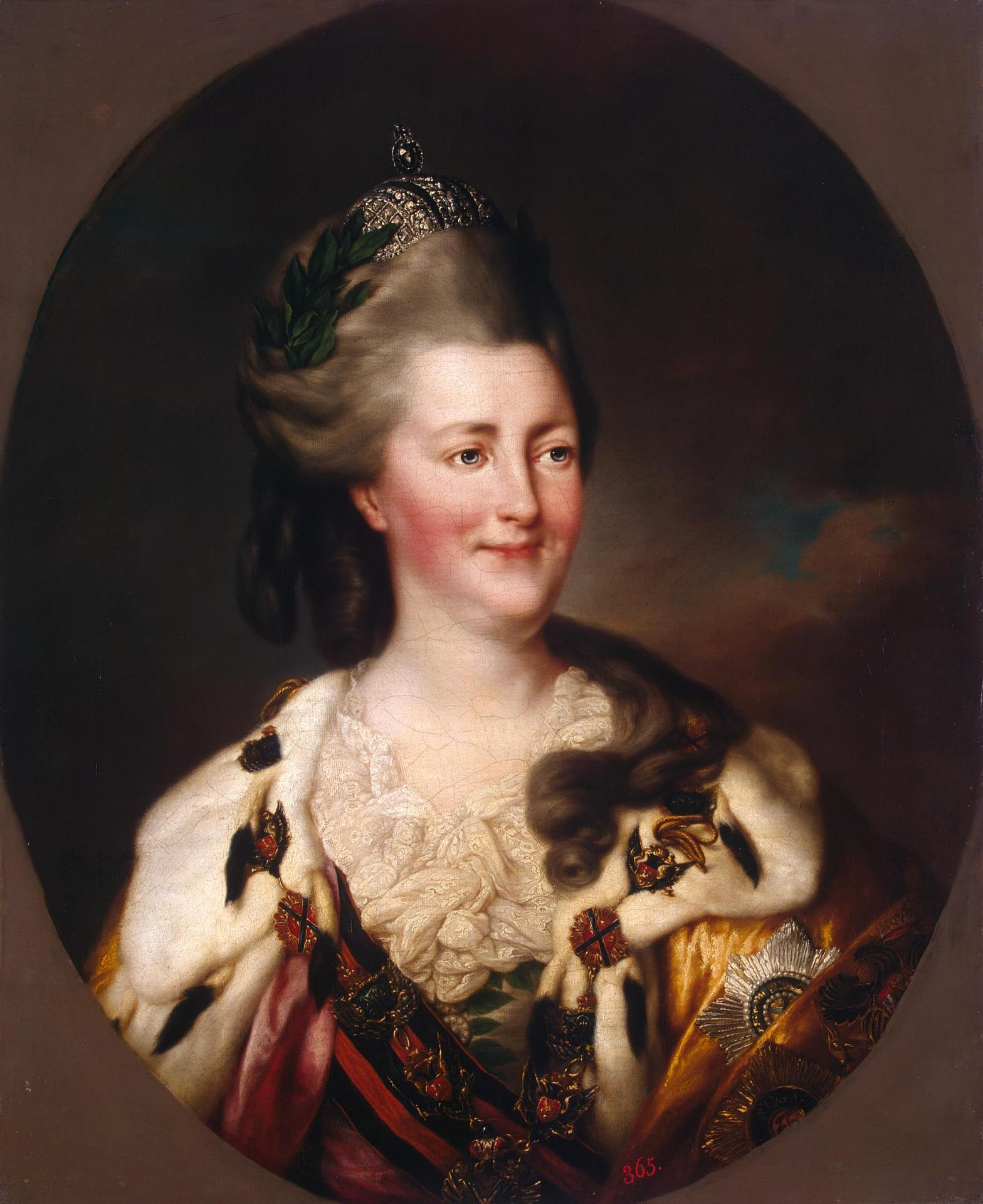 Возможно, что портрет работы англичанина Р. Бромптона, который приехал в Петербург по приглашению Екатерины II, уплатившей его долги в Англии, был написан для друга художника, придворного аптекаря Грево. Портрет исполнен как парадный, в котором художник делает акцент на атрибутах власти. Екатерина II изображена в малой императорской короне с лавровым венком, в горностаевой мантии, с большой цепью и звездой высшего ордена России - Св. Андрея Первозванного, а также с черно-желтой лентой ордена Св. Георгия 1-й степени. По всей видимости, этот поясной портрет предшествовал аллегорической картине, незавершенной из-за смерти художника.